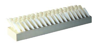 Lattenbürsten sind intelligente Systeme, um Produktionsabläufe effizienter zu gestalten